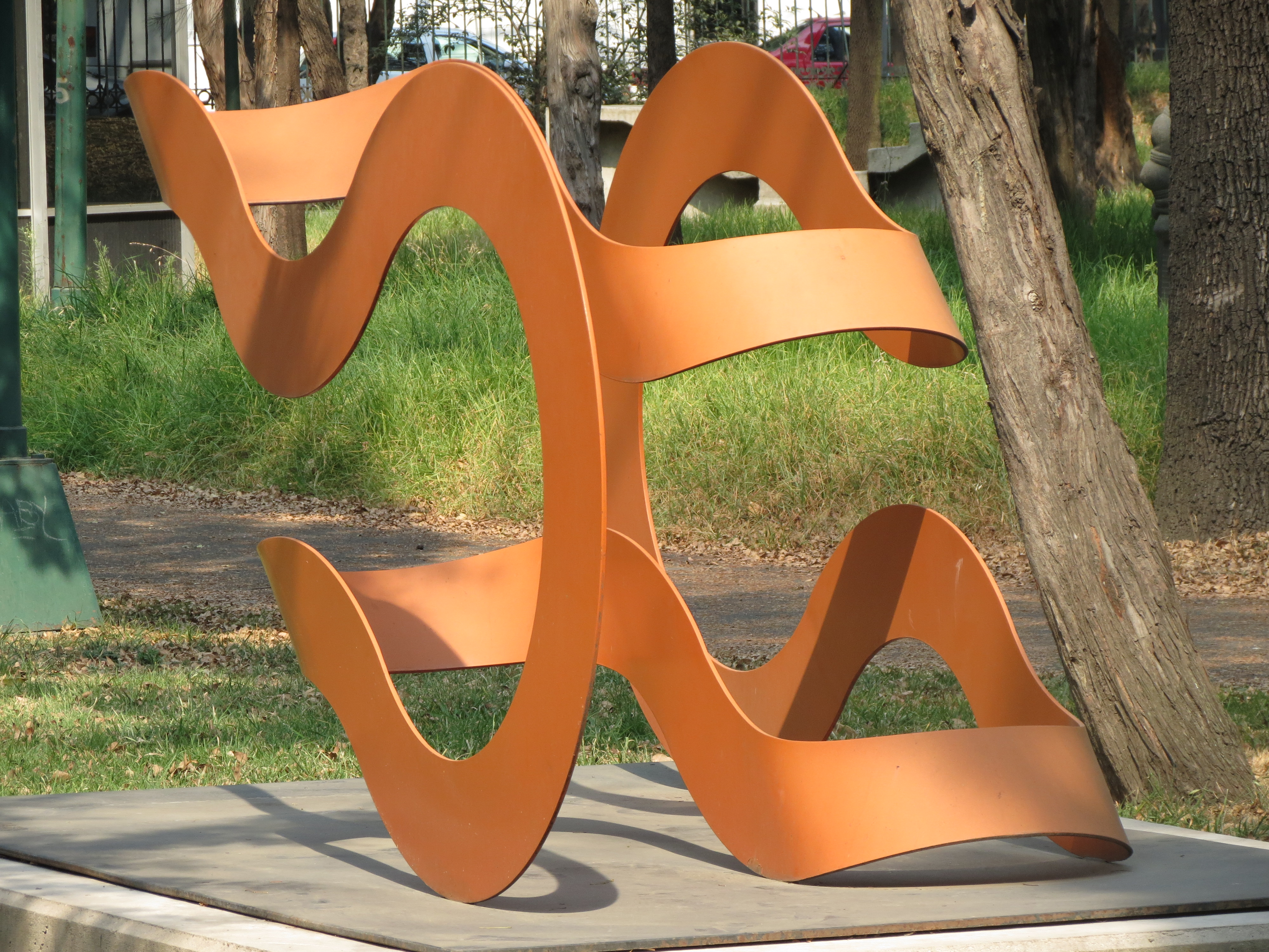 Esculturas en el jardín del Museo de Arte Moderno de la Ciudad de México